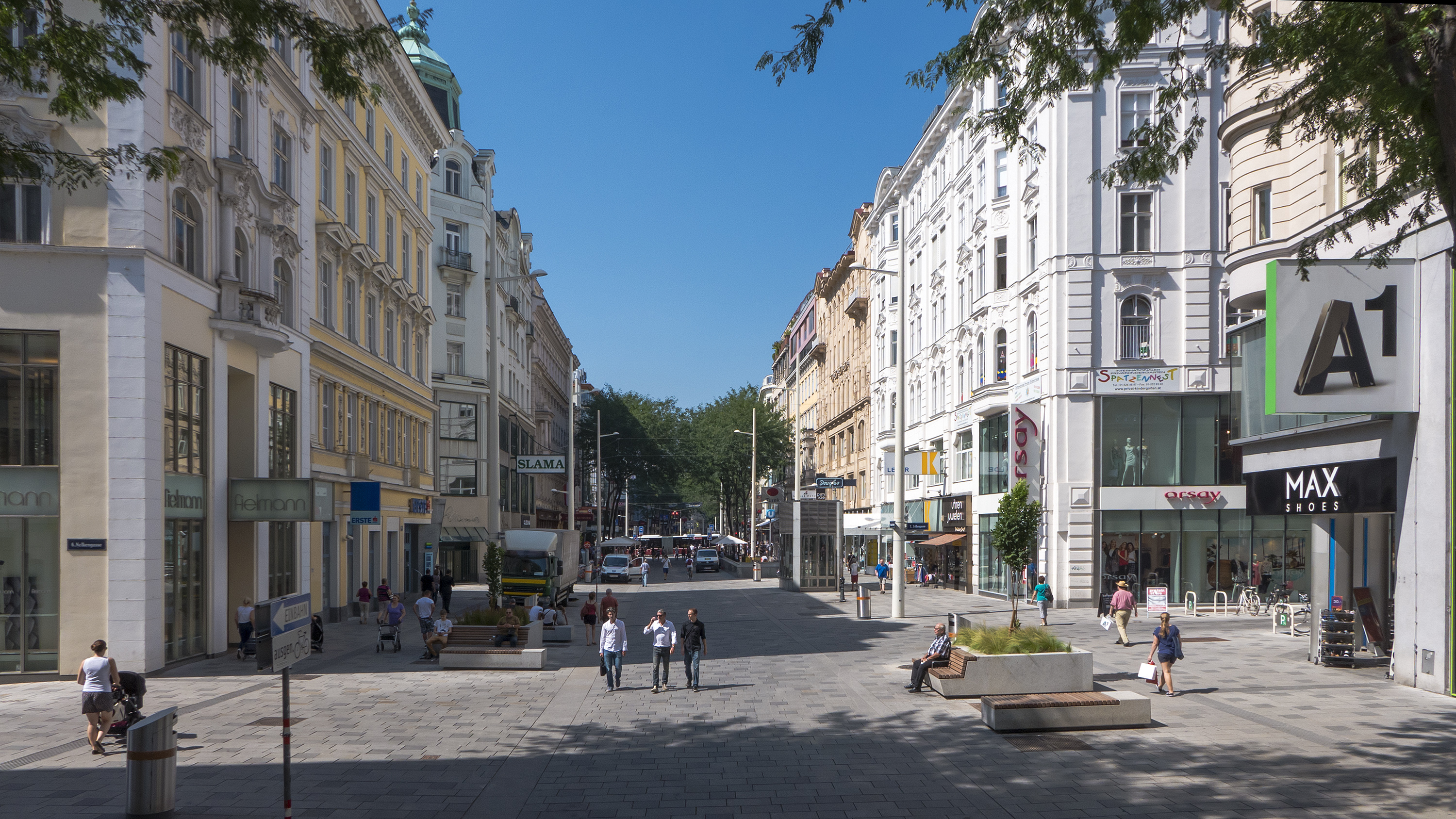 Mariahilfer Straße in Wien 6 bei Nr. 65 (Nelkengasse) Richtung Westen